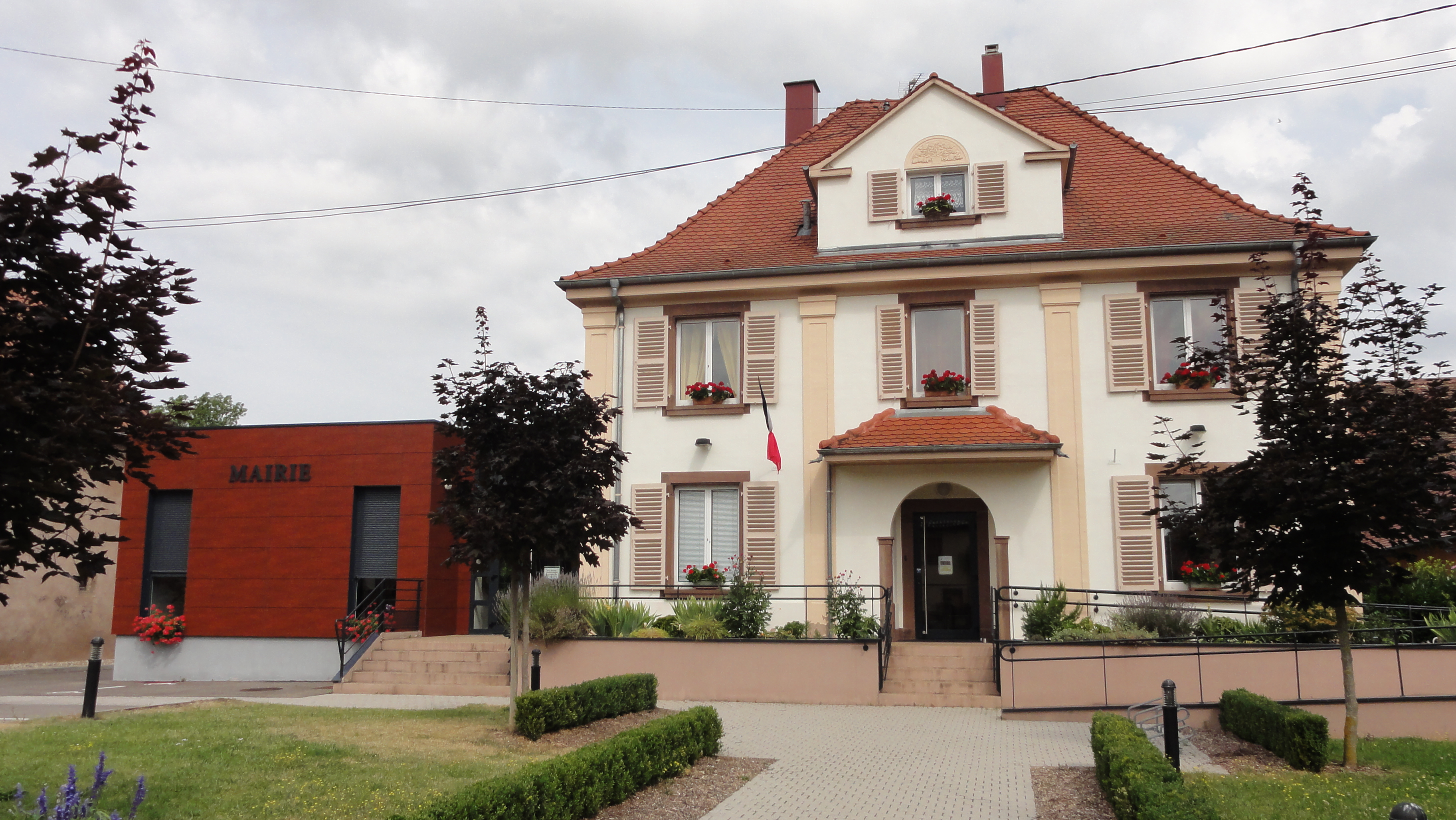 Alsace, Bas-Rhin, Furdenheim, Mairie dans l'ancien presbytère (1912), 33 rue de la Mairie. .